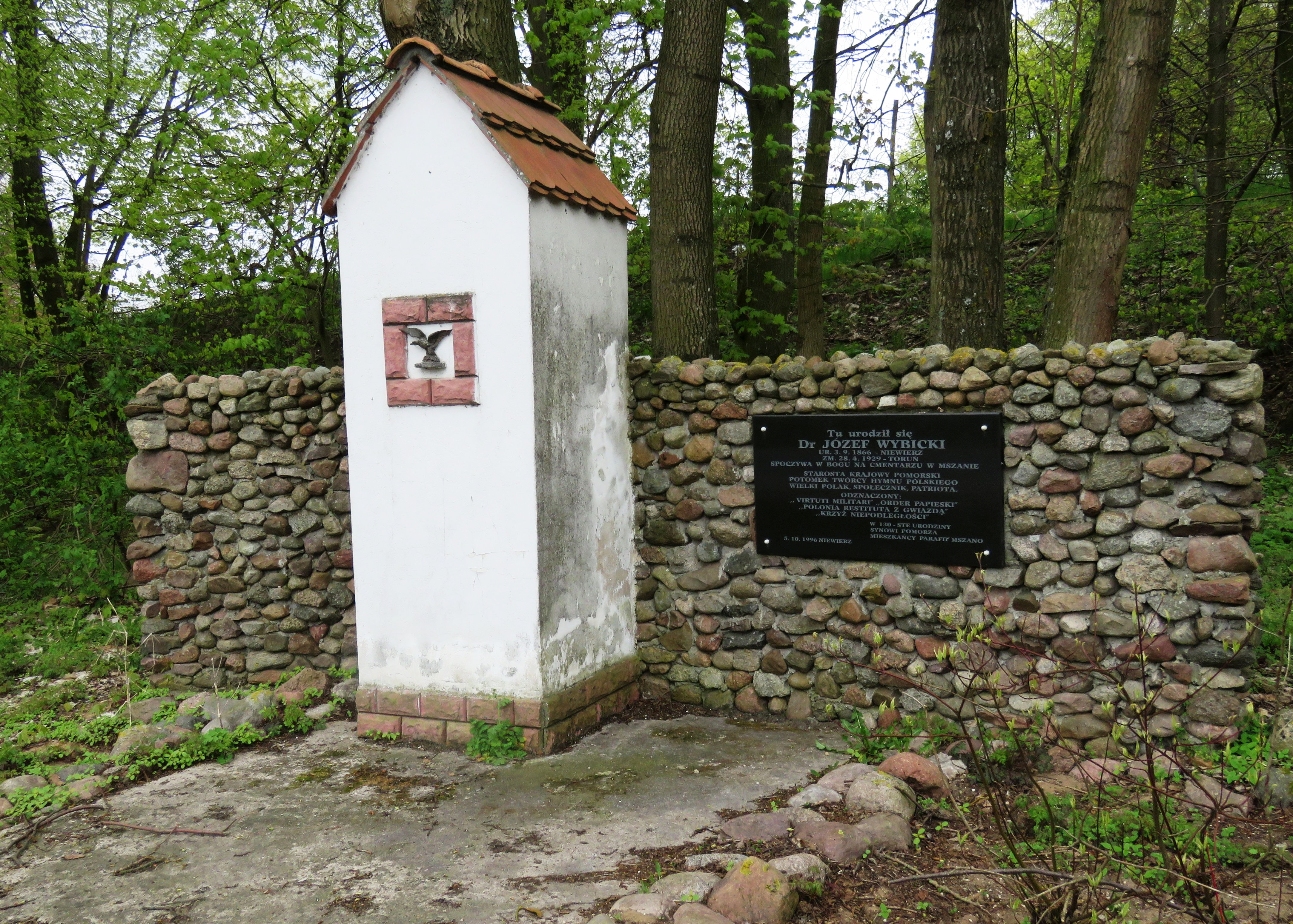 Niewierz, gmina Brodnica